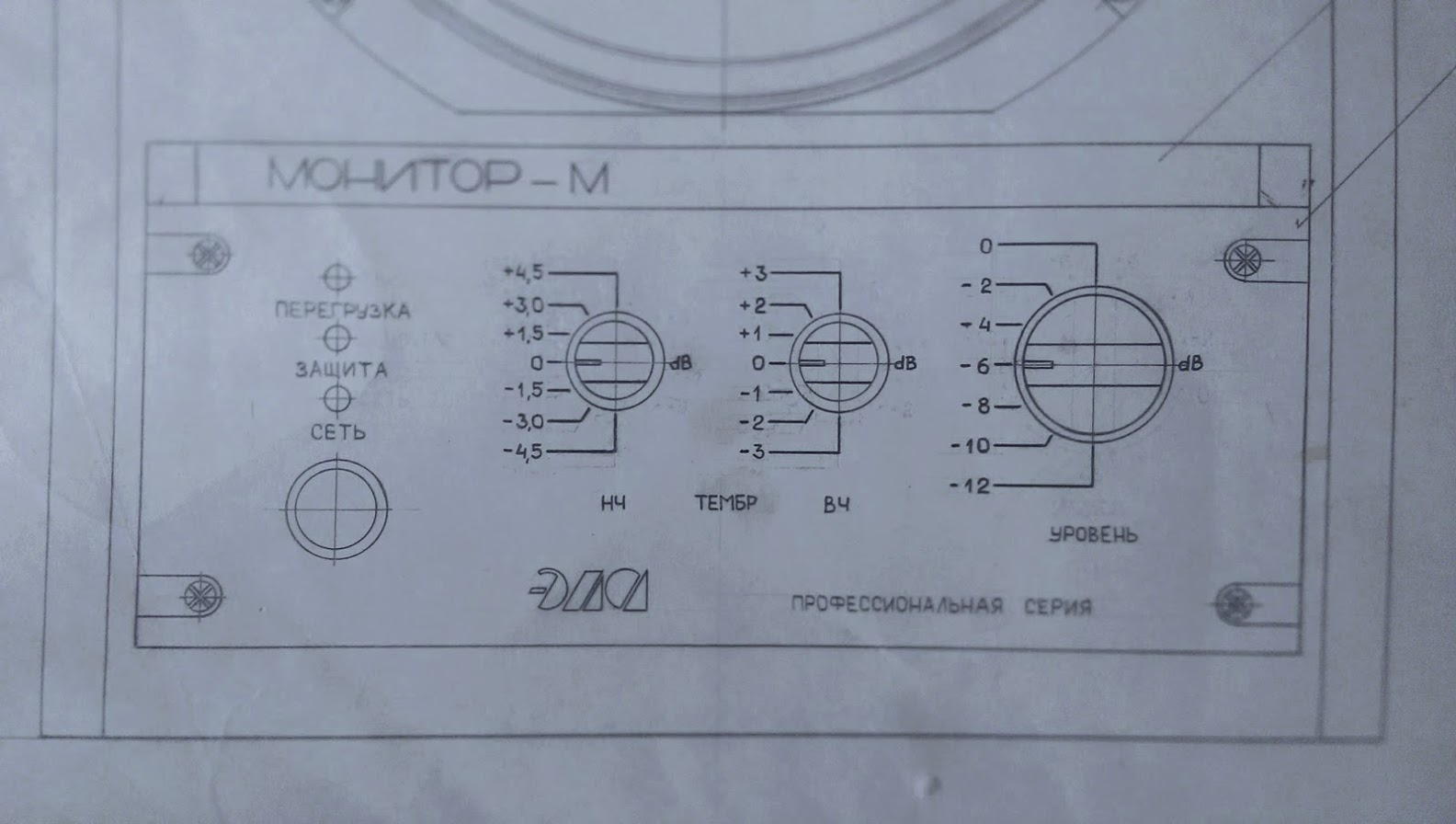 Фотография со сборочного чертежа. «Монитор – М» передняя панель АКМ-3 (Агрегат контрольный малый) разработка НИИРПА Утверждено Алдошиной Разработал Жуков